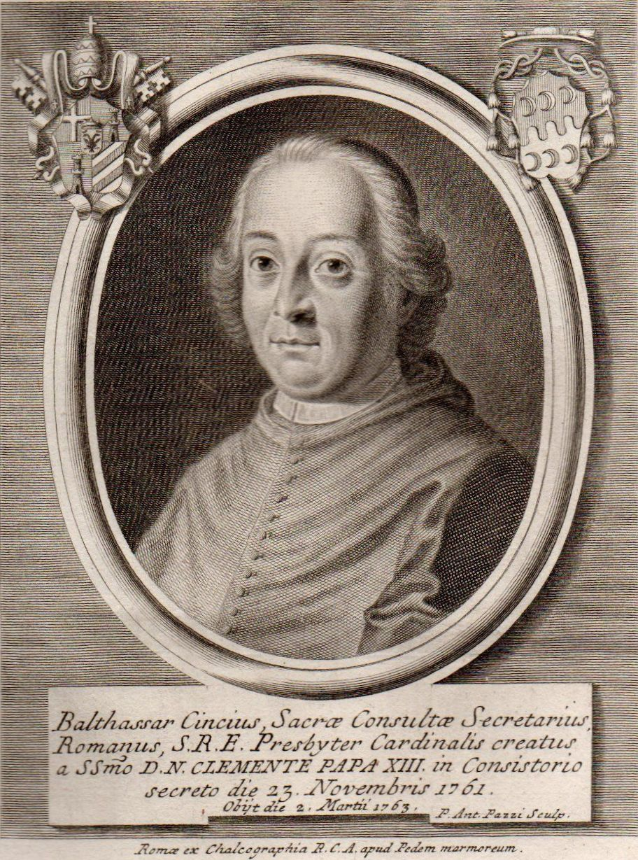 Incisione a bulino originale Periodo XVIII secolo